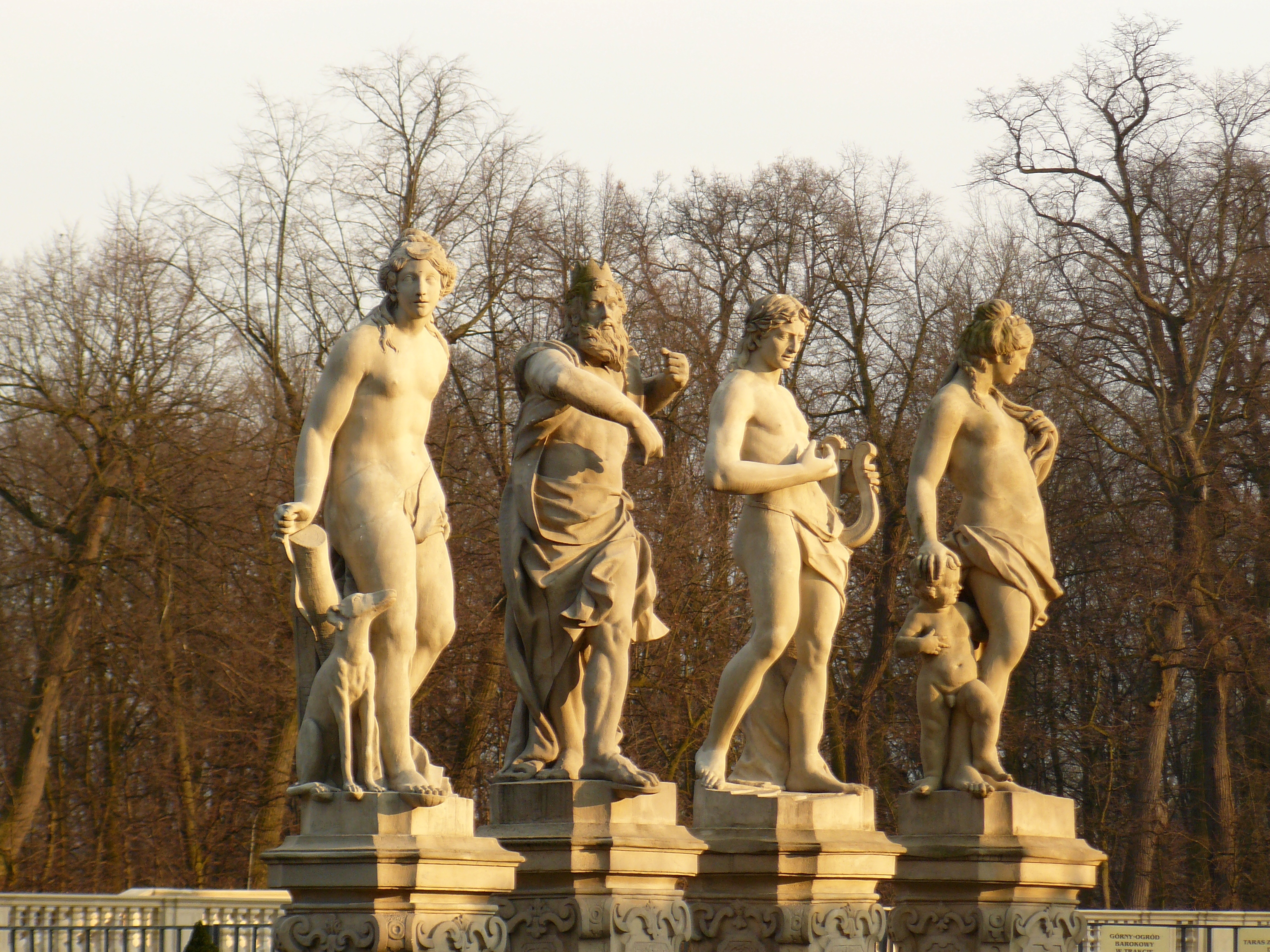 zespół pałacowo-ogrodowyrzeźba figuralna #balustrady, posągi kamienne i ceramiczne#, XVIII, XIX Warszawa, dz. Wilanów 07.1965.